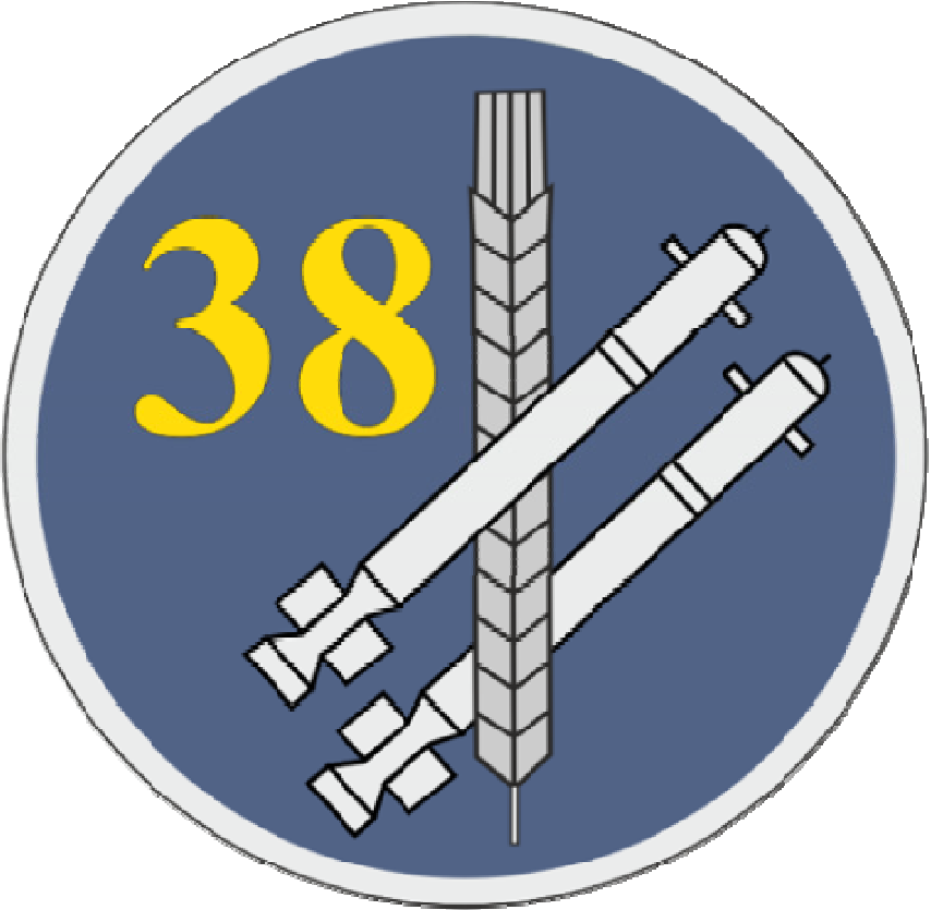 Oznaka rozpoznawcza na mundur wyjściowy 38 dzab OP